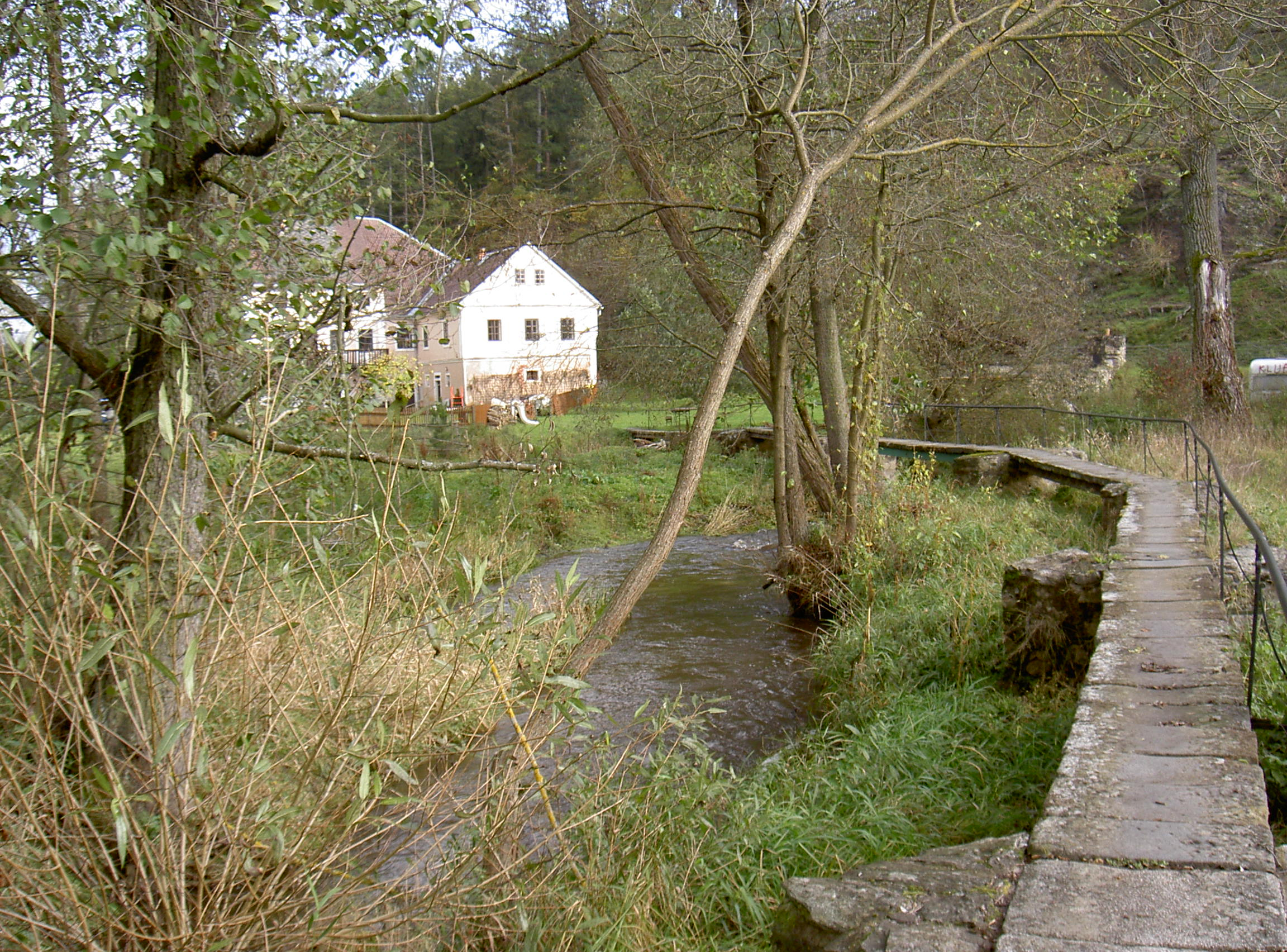 Štítary (Hostouň) Alte Mühle